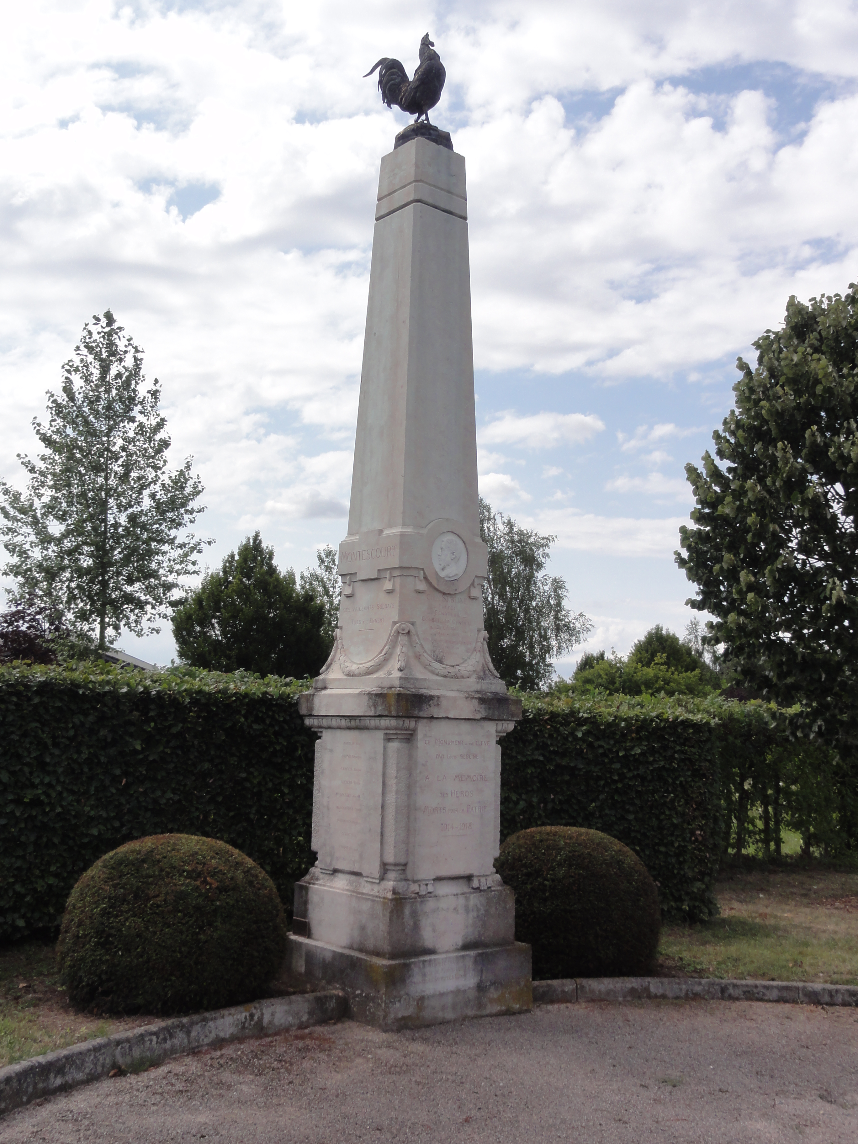 Montescourt-Lizerolles (Aisne) mémorial de guerre